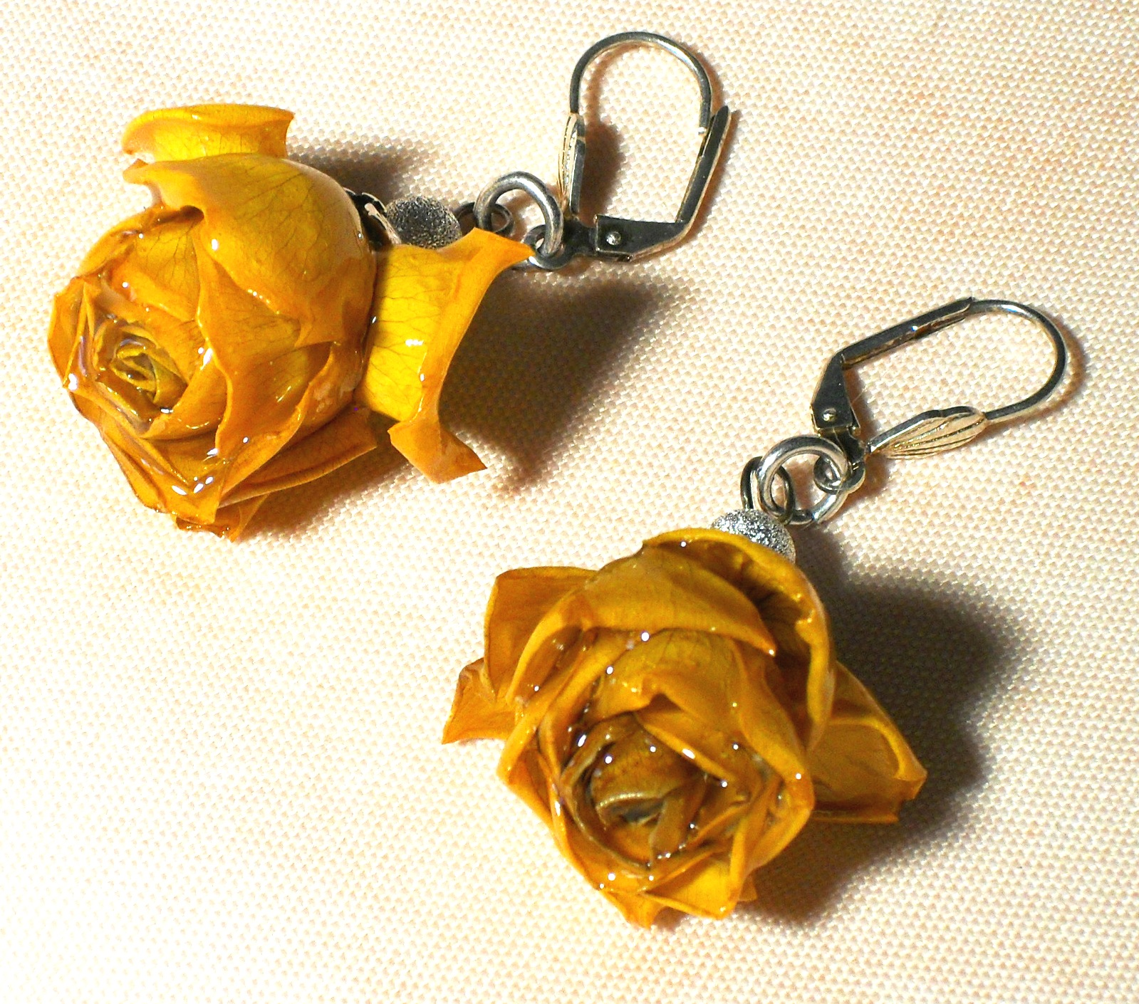 Boucles d'oreilles roses naturelles jaunes vitrifiées; création "Les Roses de Peyruis"